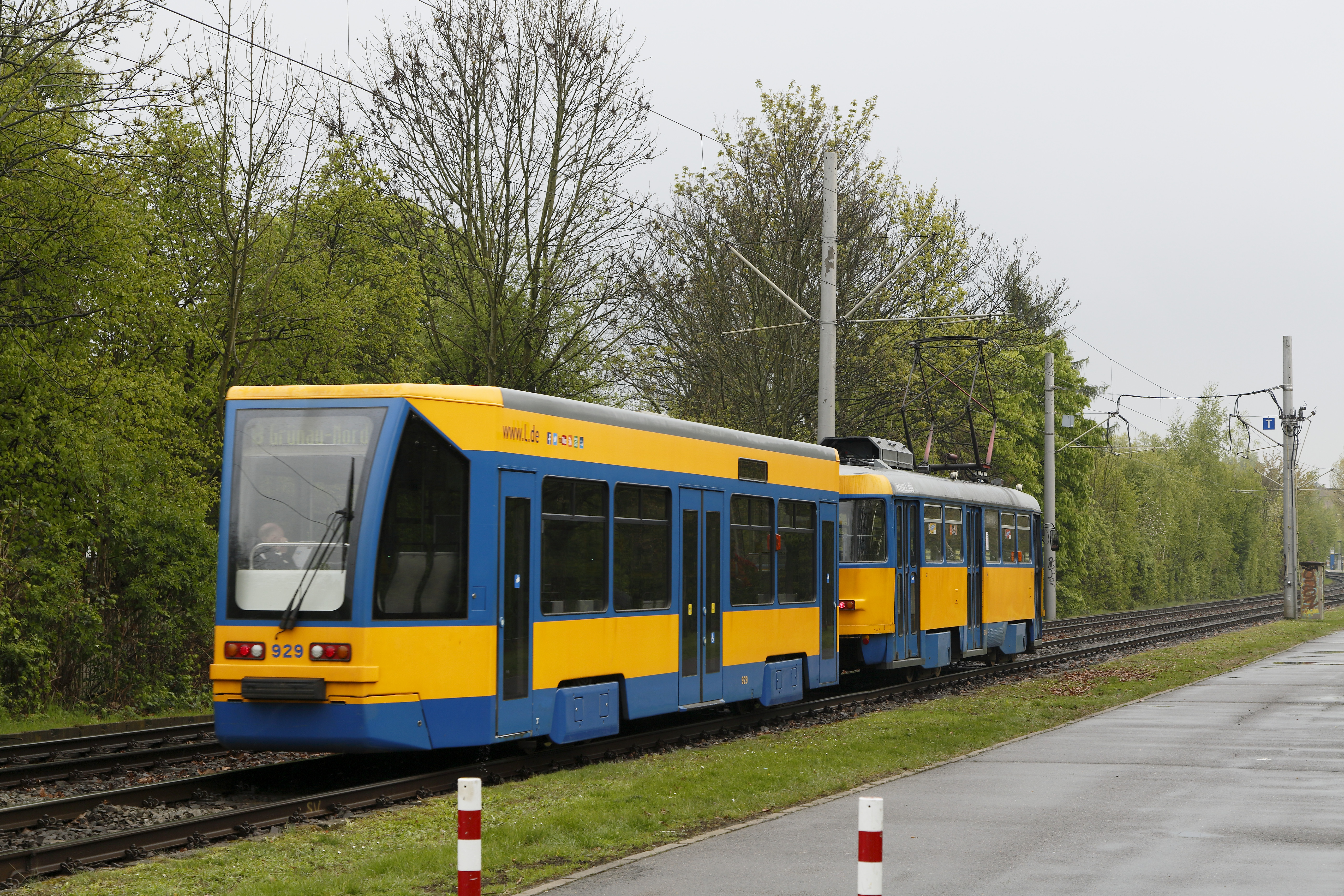 Zug der Linie 8 nach Grünau Nord zwischen Permoser- und Riesaer Straße, Nachschuss. Der Beiwagen (Typ 68) ist noch nicht umlackiert.